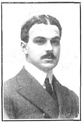 D. Jorge Silvela. Fotografía de Christian Franzen, recogida en la revista española Nuevo Mundo.